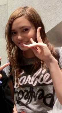 リバースエム（2016年、渋谷） This file has been extracted from another file: リバースエムCIMG3659.jpg